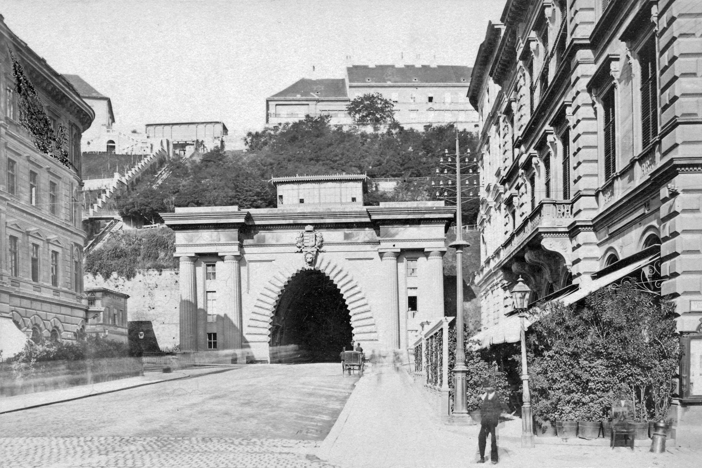 Clark Ádám (Lánchíd) tér. Location: Hungary, Budapest I. Tags: Budapest Title: Clark Ádám (Lánchíd) tér.